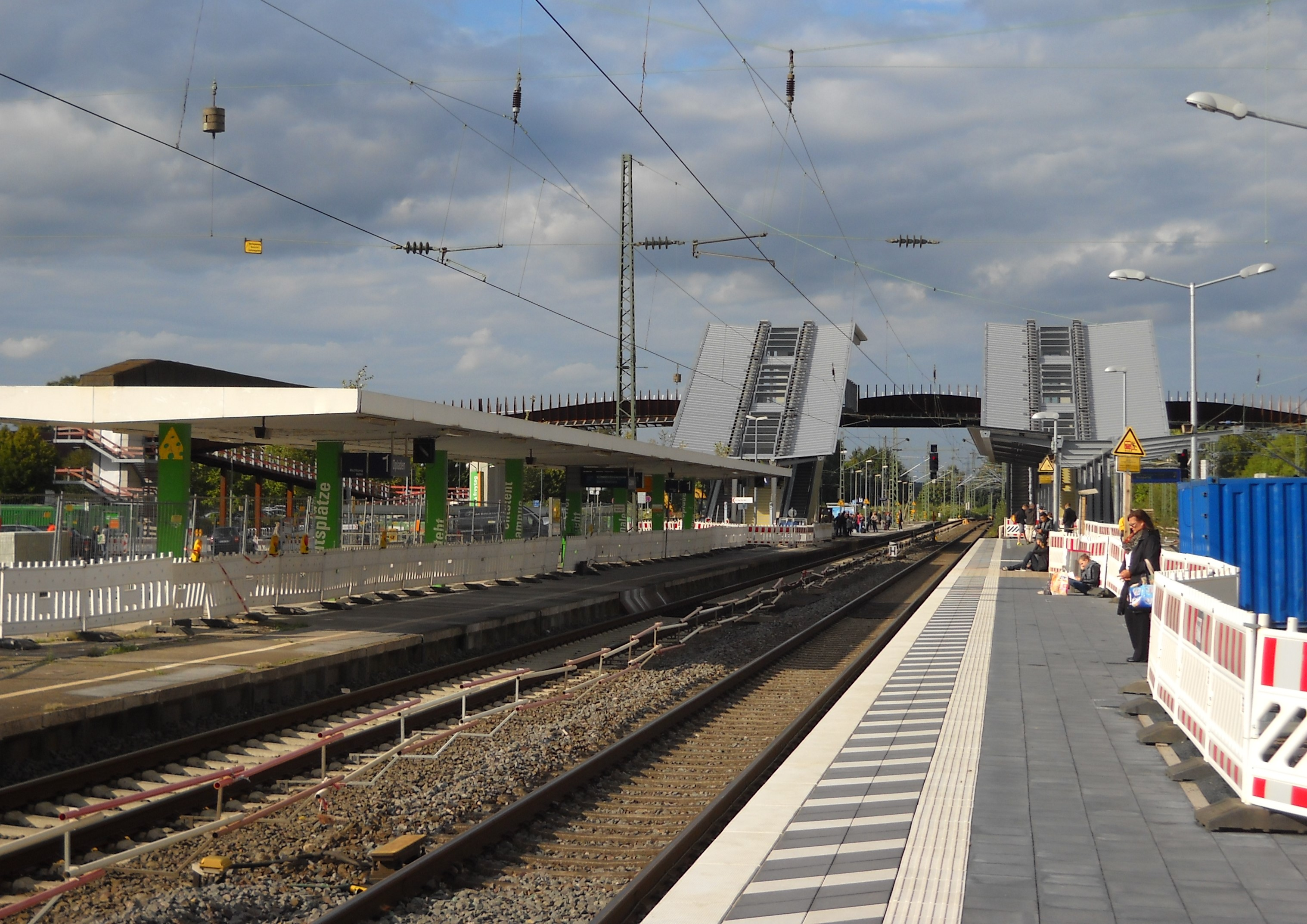 Umbauzustand des Bahnhofs Opladen im September 2015.